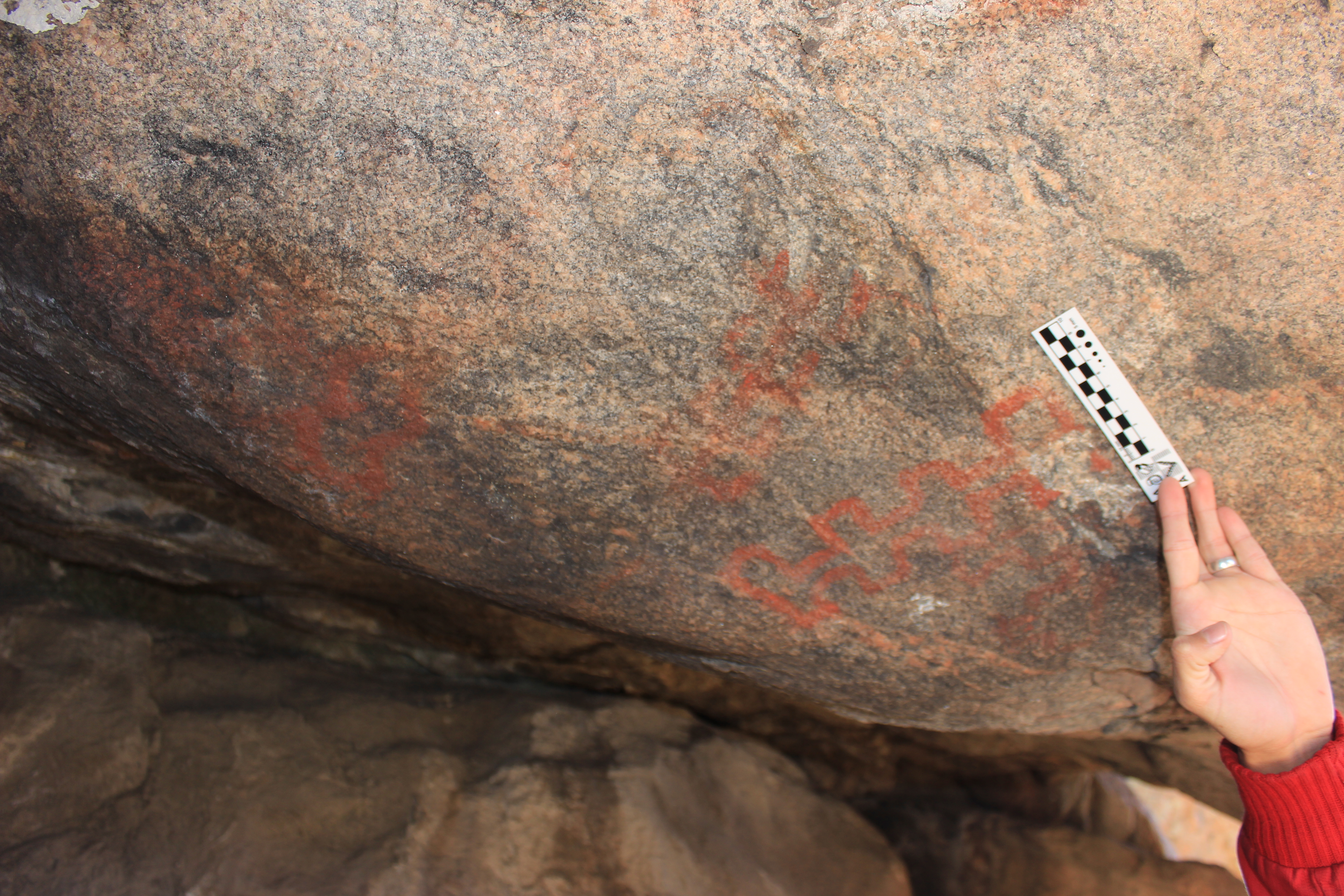 Pintura rupetre en alero. Estilo de grecas, ampliamente distribuido en la Patagonia